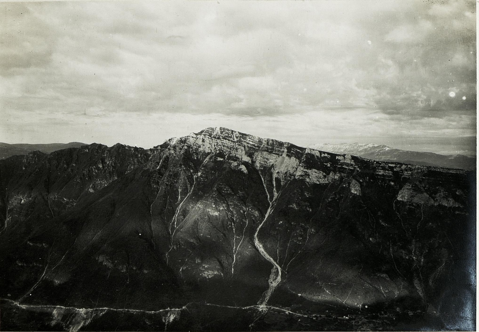 Panorama vom Monte Spil gegen Höhenzug Coni Zugna, Pass Buole, Cima Levante und der Cima Posta Gruppe mit dem Brandtal.